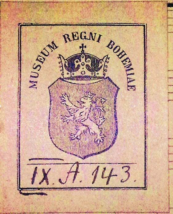 Signatura z dokumenu v ČMH